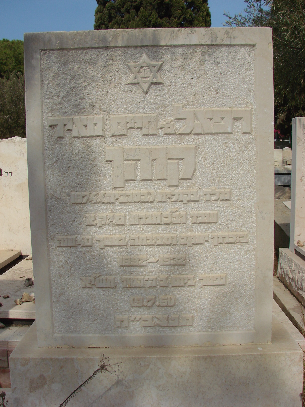 קברו של רפאל קוהן בזכרון יעקב